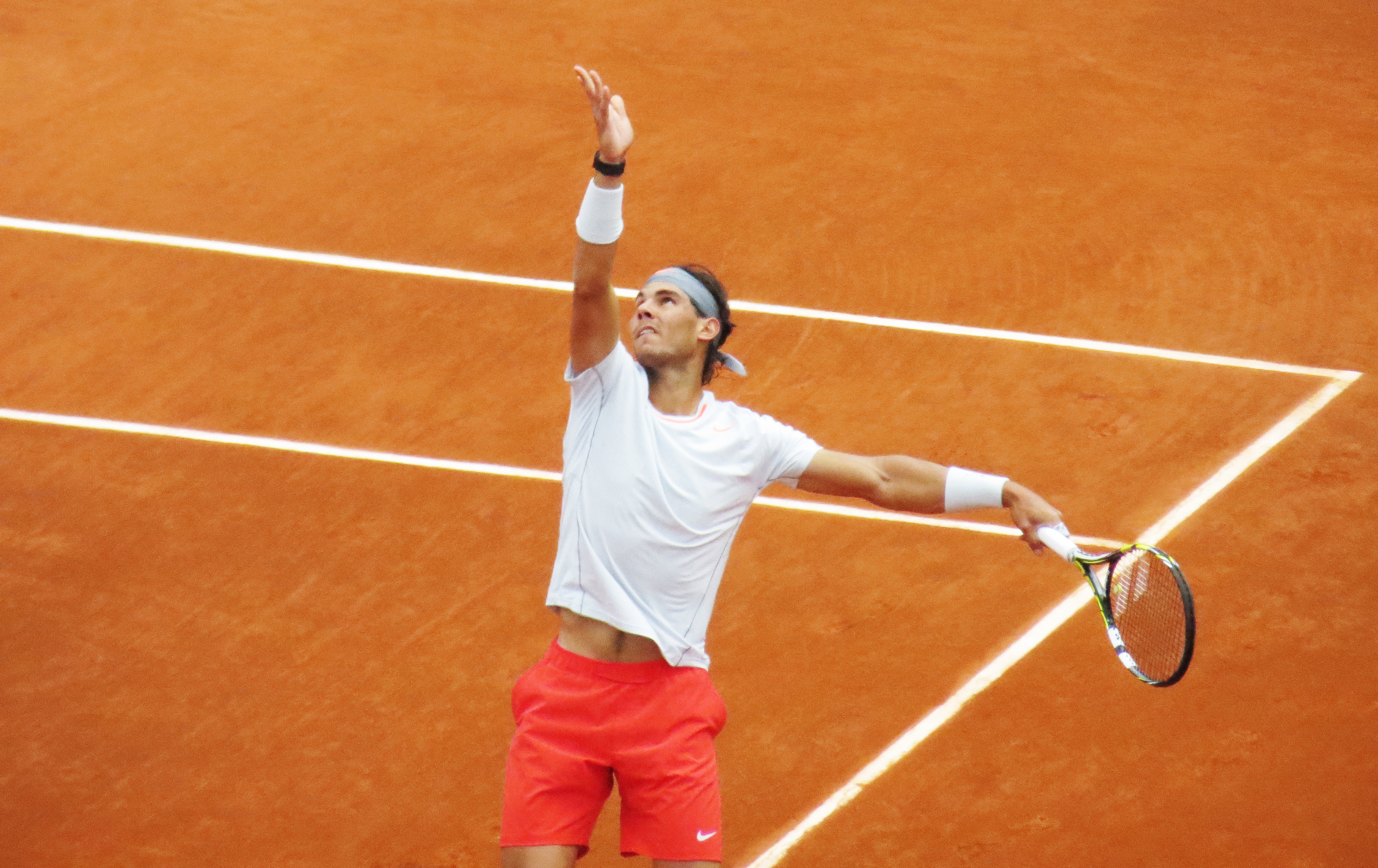 rafa serve